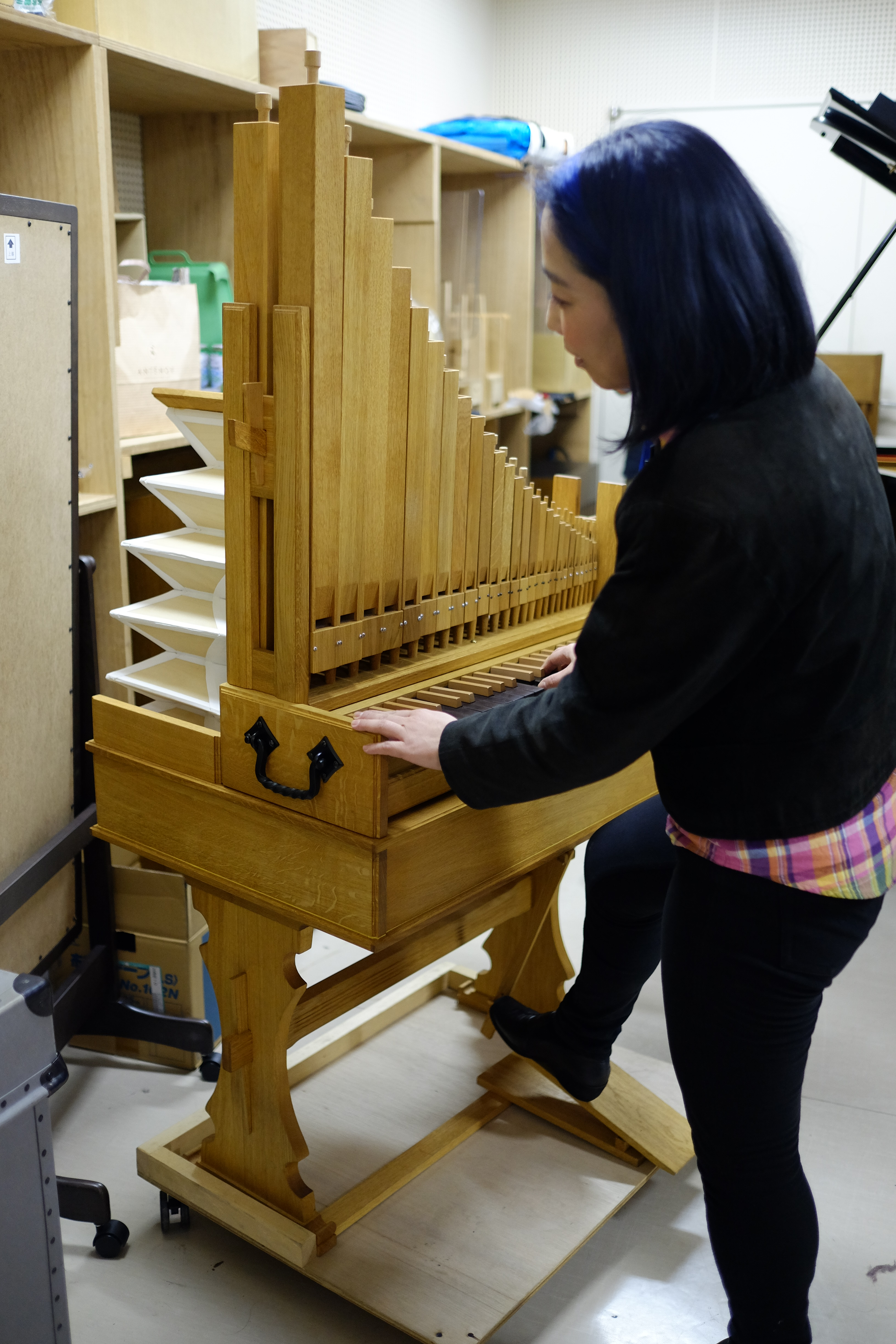 JA:横浜みなとみらいホールのポジティフオルガンの全体